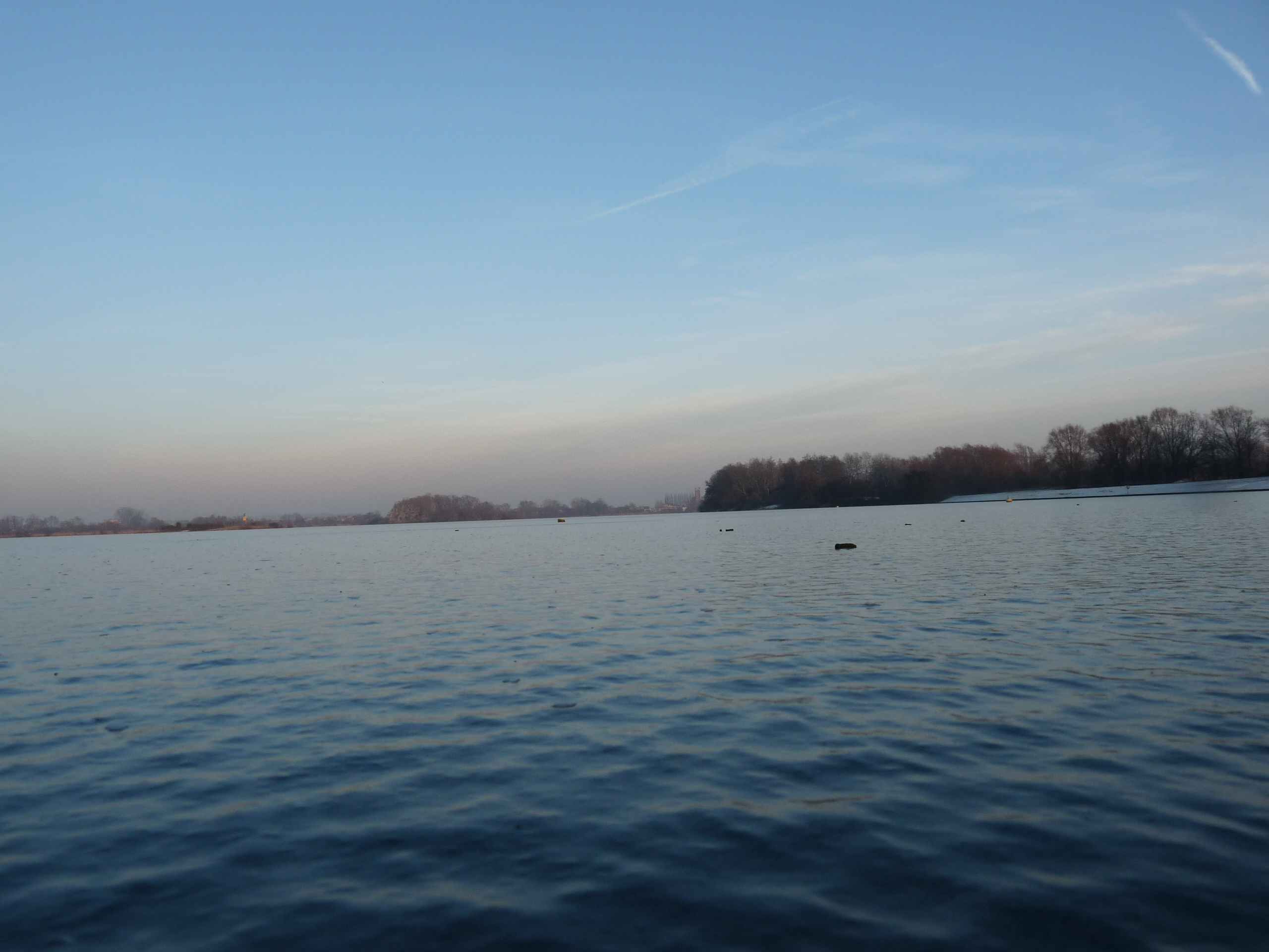 Les prés du Hem, parc naturel à Armentières (Nord-pas-de-Calais, France)